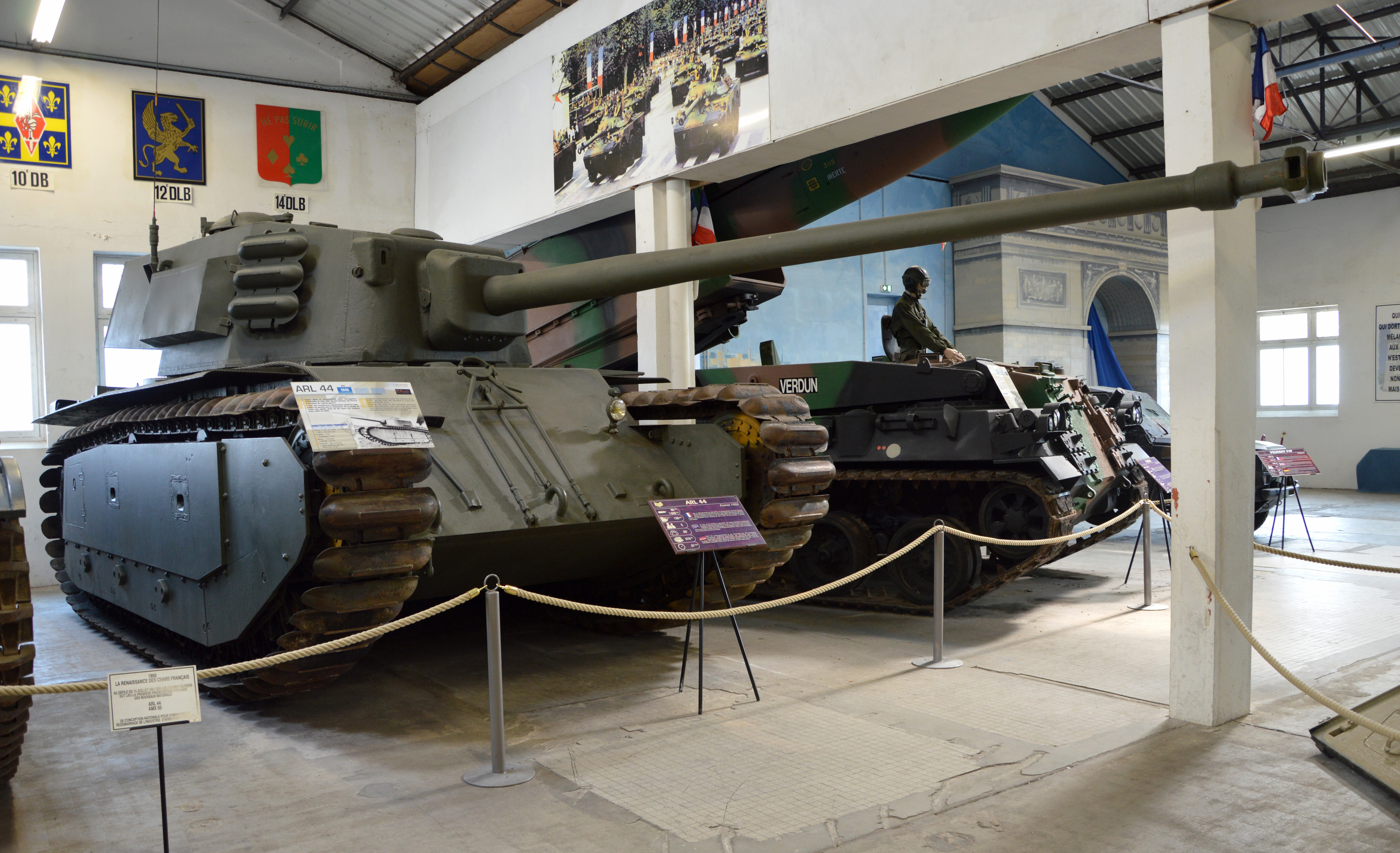 ARL 44 in the Musée des Blindés